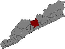 Localització d'Arenys de Munt al Maresme